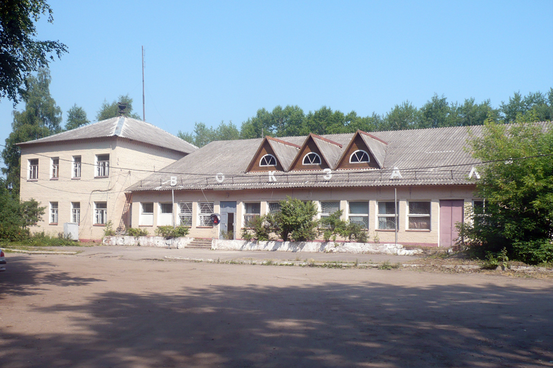 Железнодорожный вокзал в г. Бежецке